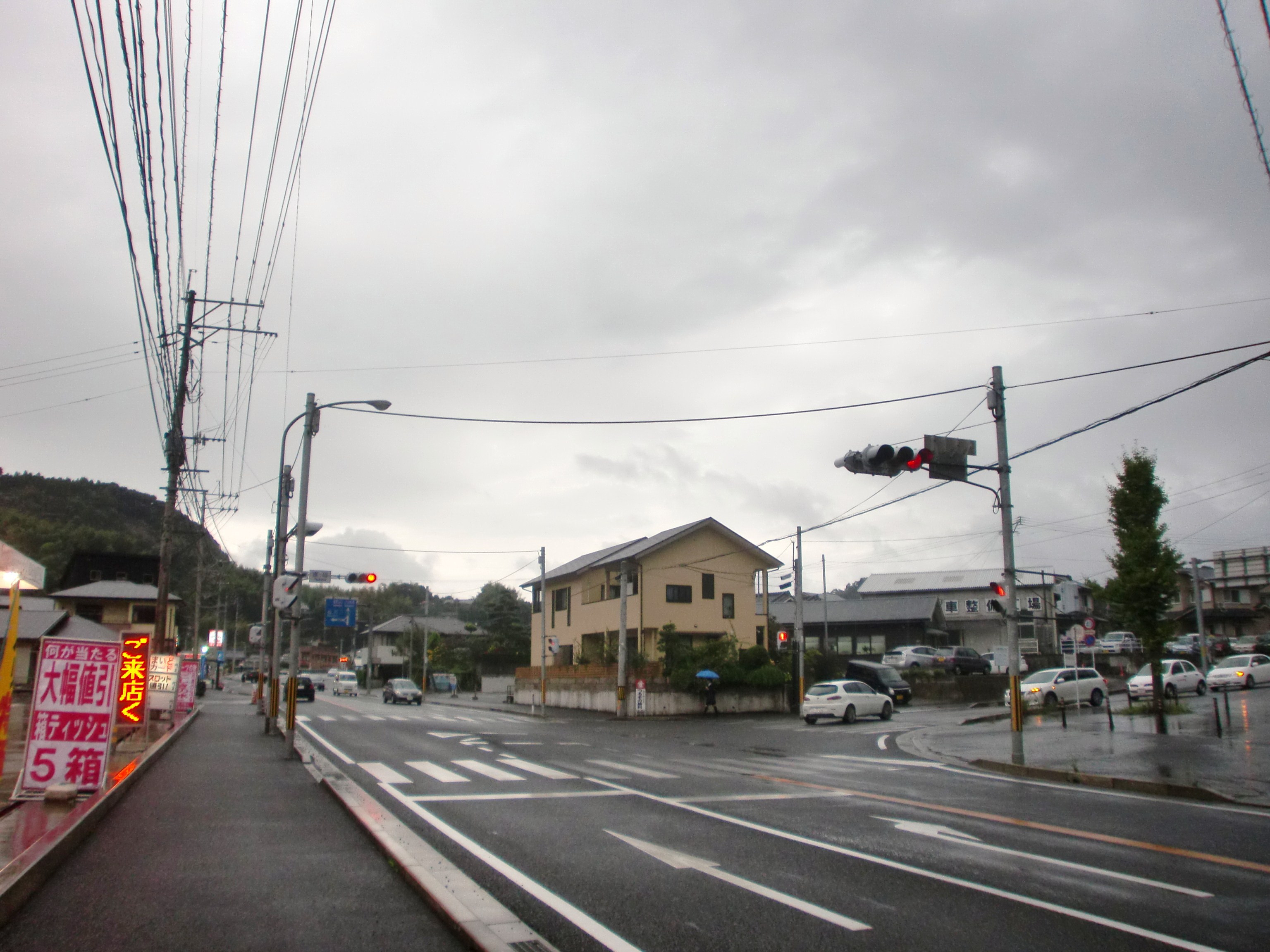 国道3号とja:鹿児島県道211号小山田川田蒲生線の交差点（塚田交差点）。